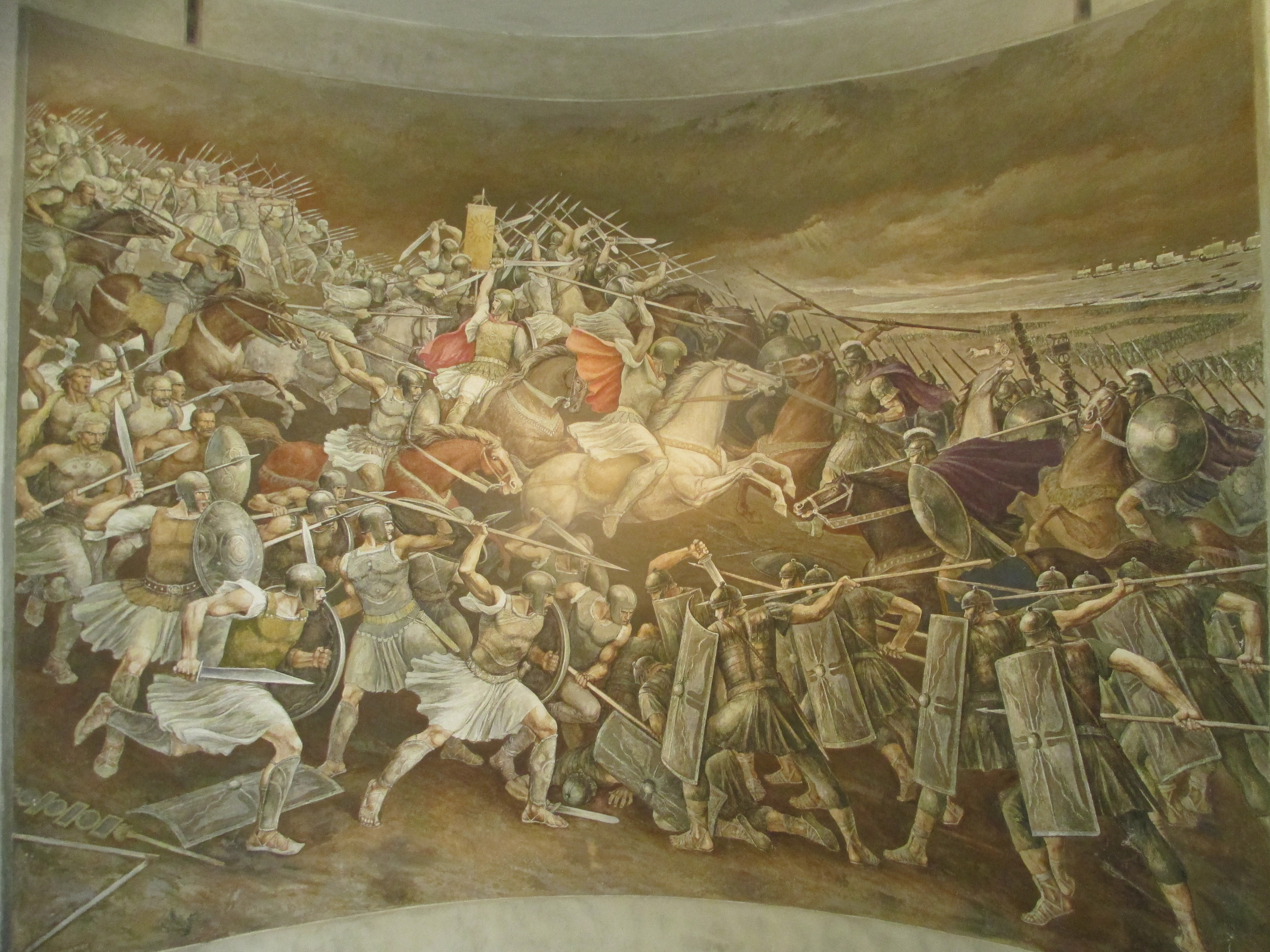 Guerre illiriche